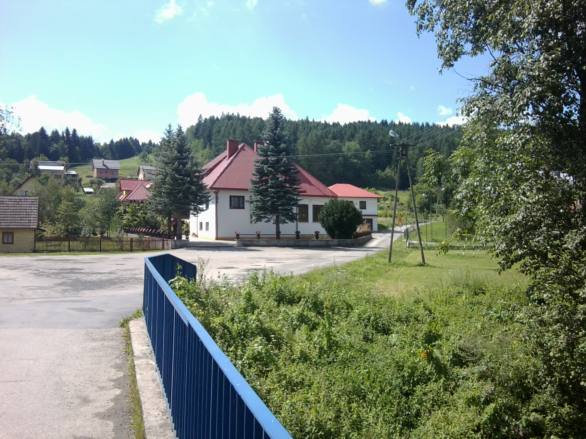 Kościół w Olszance(województwo małopolskie)